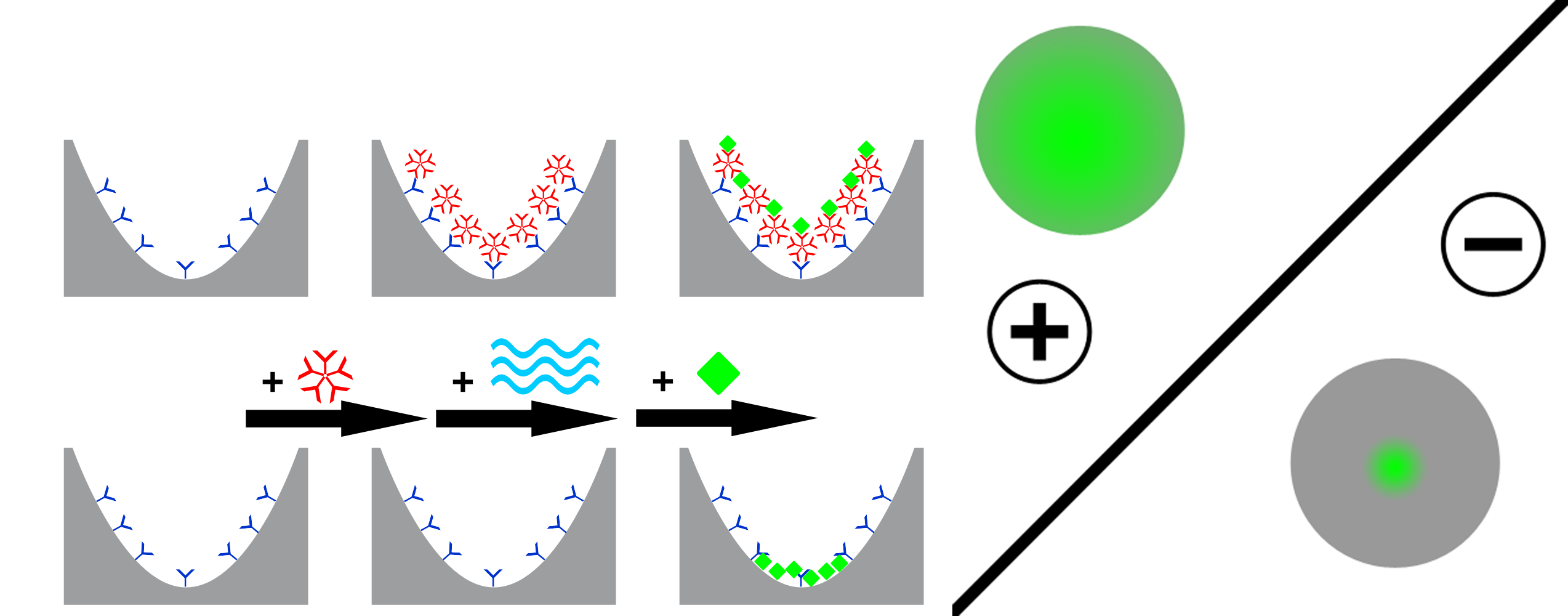 Eine Microtiterplatte ist mit Antikörper gegen Human IgM (blau) beschichtet. Dazu gibt man die Probe (Blutserum). Alle vorhandenen IgMs (rot) werden gebunden. Die Platte wird vorsichtig gewaschen. Das Antigen gegen welches Antikörper nachgewiesen werden sollen, wird zugegeben. Waren IgMs gegen das gesuchte Antigen vorhanden, wird dieses auf der gesamten Oberfläche agglutiniert; es bildet sich von oben gesehen ein Rasen (obere Zeile). Waren keine Antikörper vorhanden, so sinkt das zugegebene Antigen ab. Es bildet sich ein Punkt in der tiefsten Stelle der Microtiterplatte. (untere Zeile).